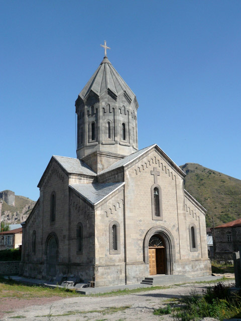 Церковь Григория Просветителя в г.Горис